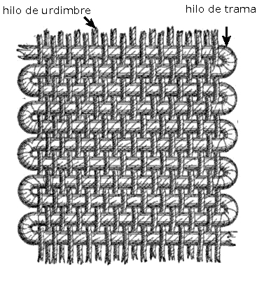 Osnova a utek